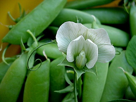 Sugar snaps met bloesem